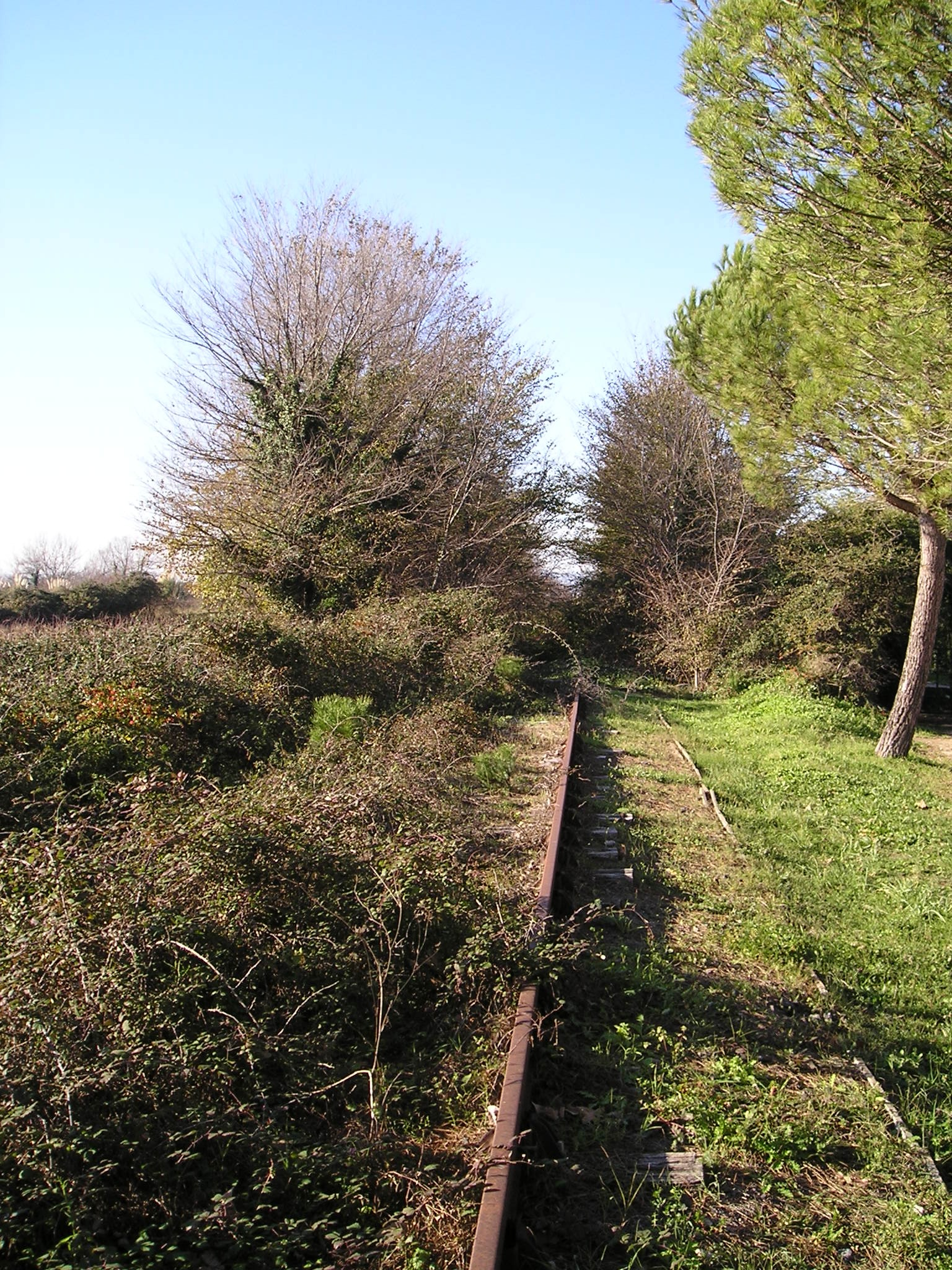 Voie SNCF rue de la Gare à Saint-Jean-de-Védas en décembre 2006.